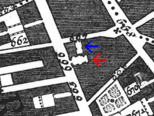 Pianta di Nolli